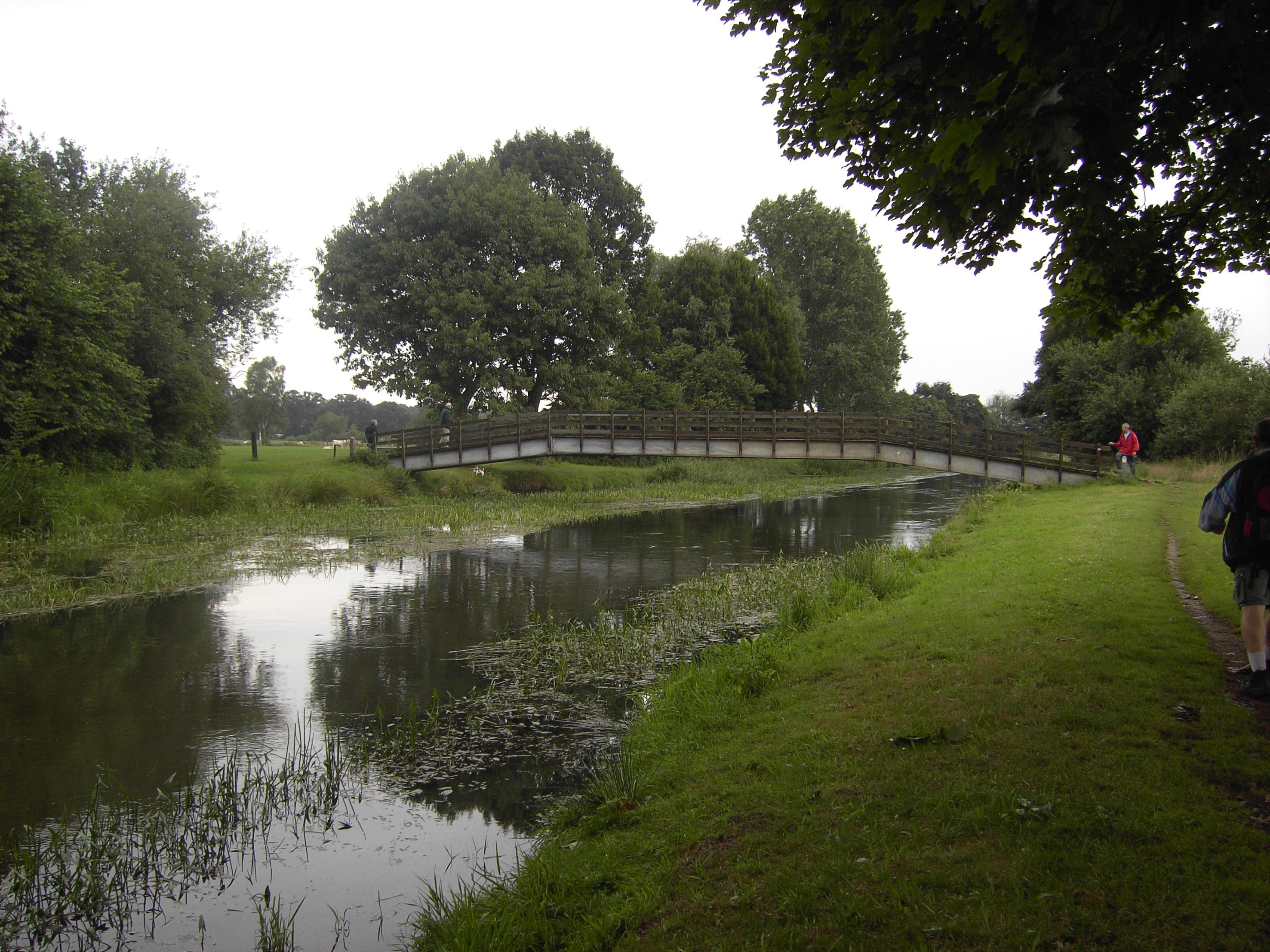 Kleine Nete nabij Kasterlee - Provincie Antwerpen - België